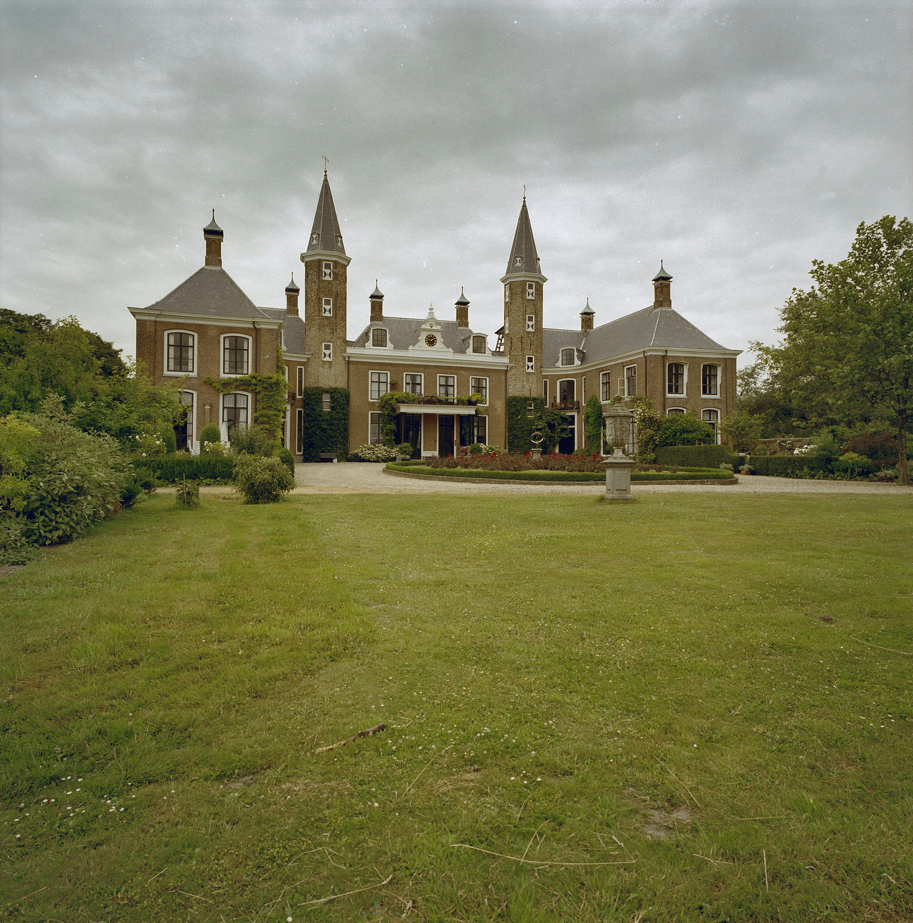 Slot (Huis) Ter Hooge: Exterieur OVERZICHT VOORGEVEL